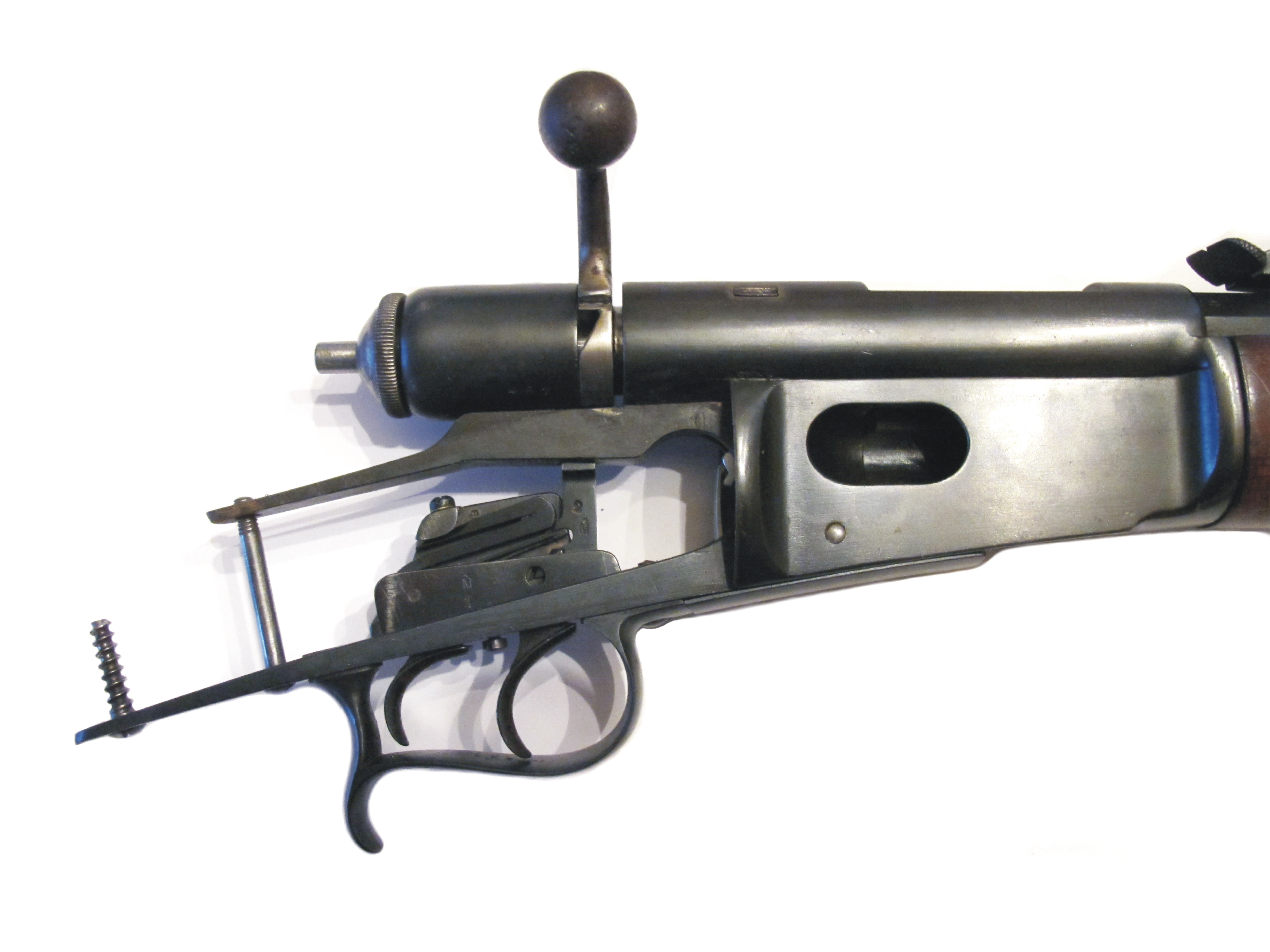 Boîte de culasse de la carabine à répétition Vetterli modèle de 1881, vue coté droit, avec la double détente.